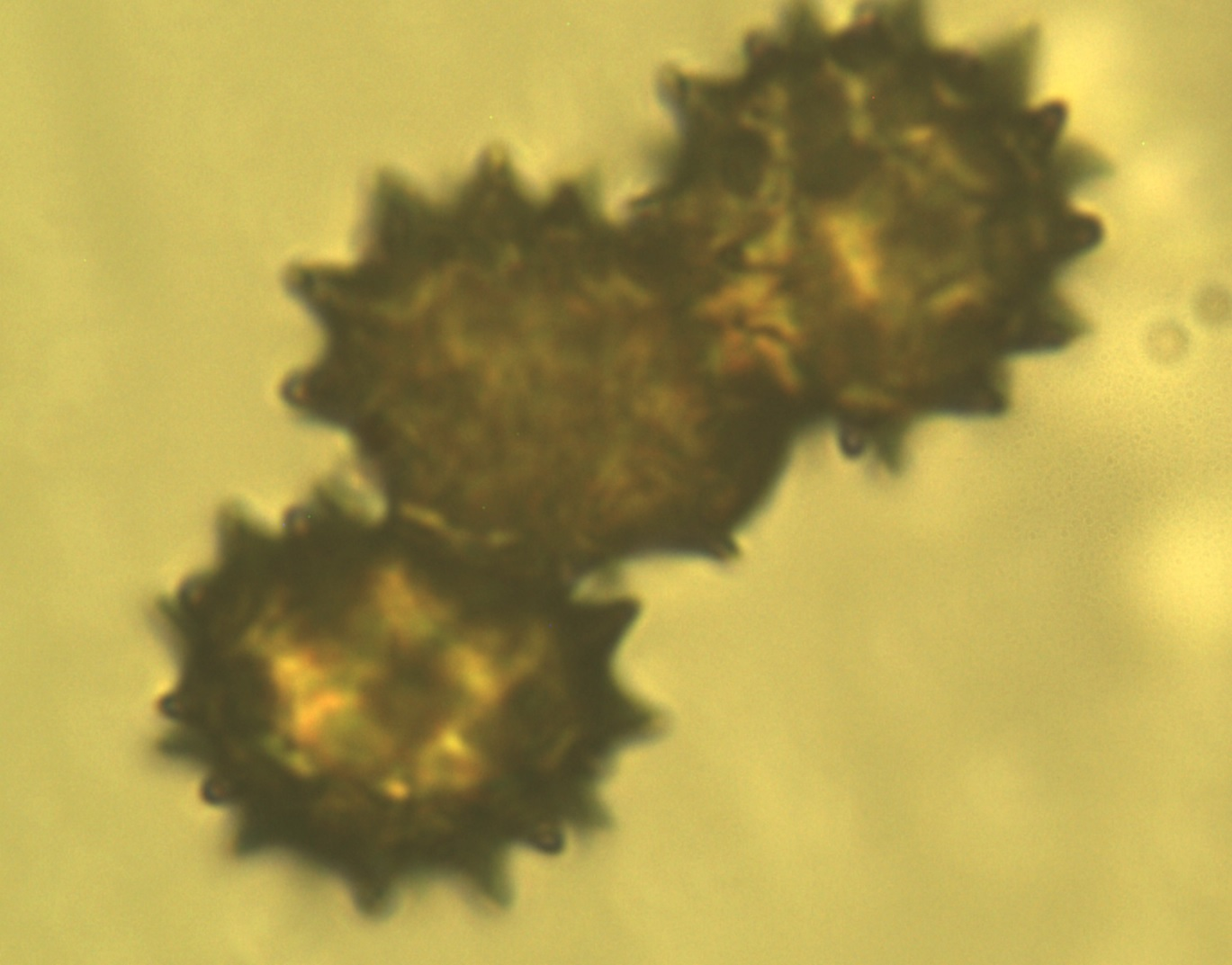 Anthemis tinctoria Pollen 400x